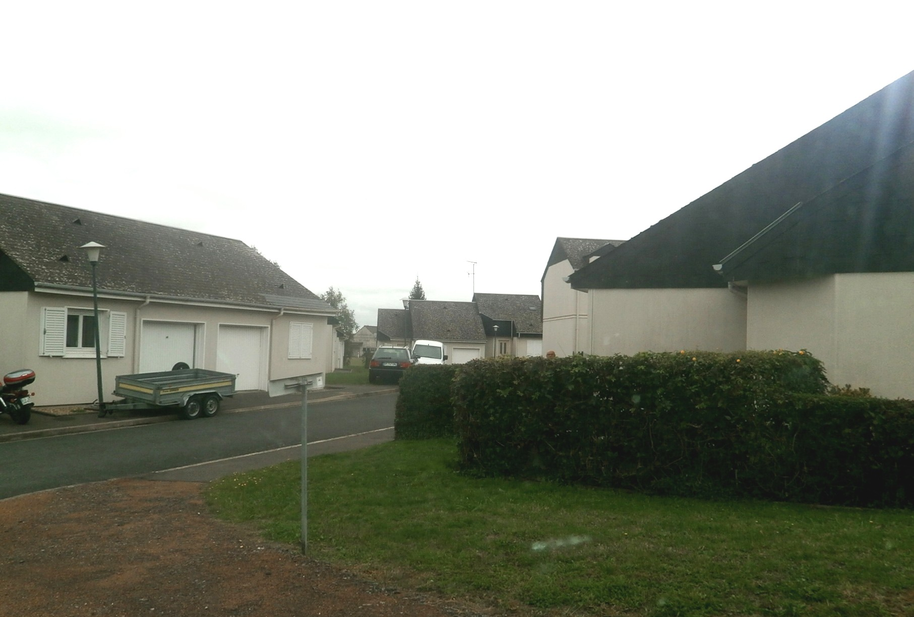 Lotissement récent sur la commune de Loché-sur-Indrois